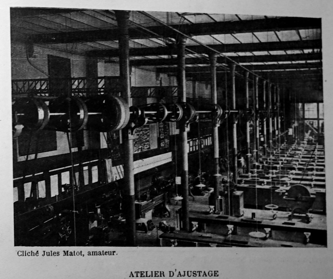 publié dans le "Bulletin de l'œuvre des voyages scolaires".